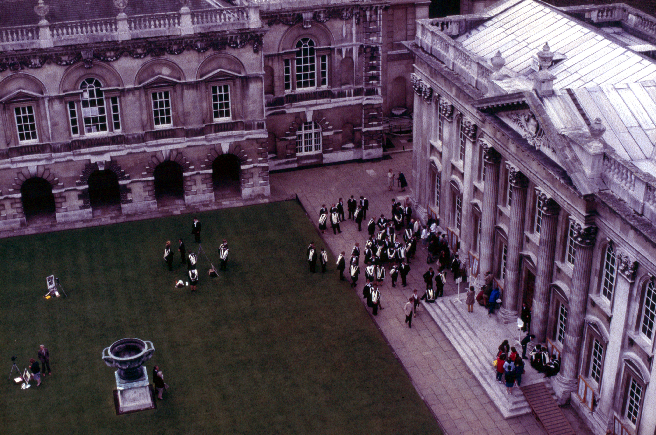 1985 in Cambridge